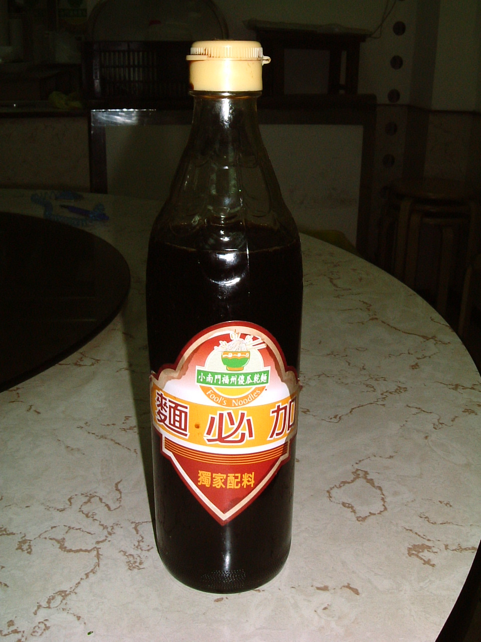 吃「傻瓜乾麵」必加的調味料 - 麵必加，當然要吃清淡，也可以不用加